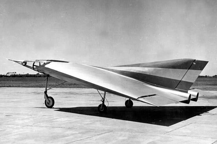 Planeador FMA I.A.37 de primera etapa, casi terminado